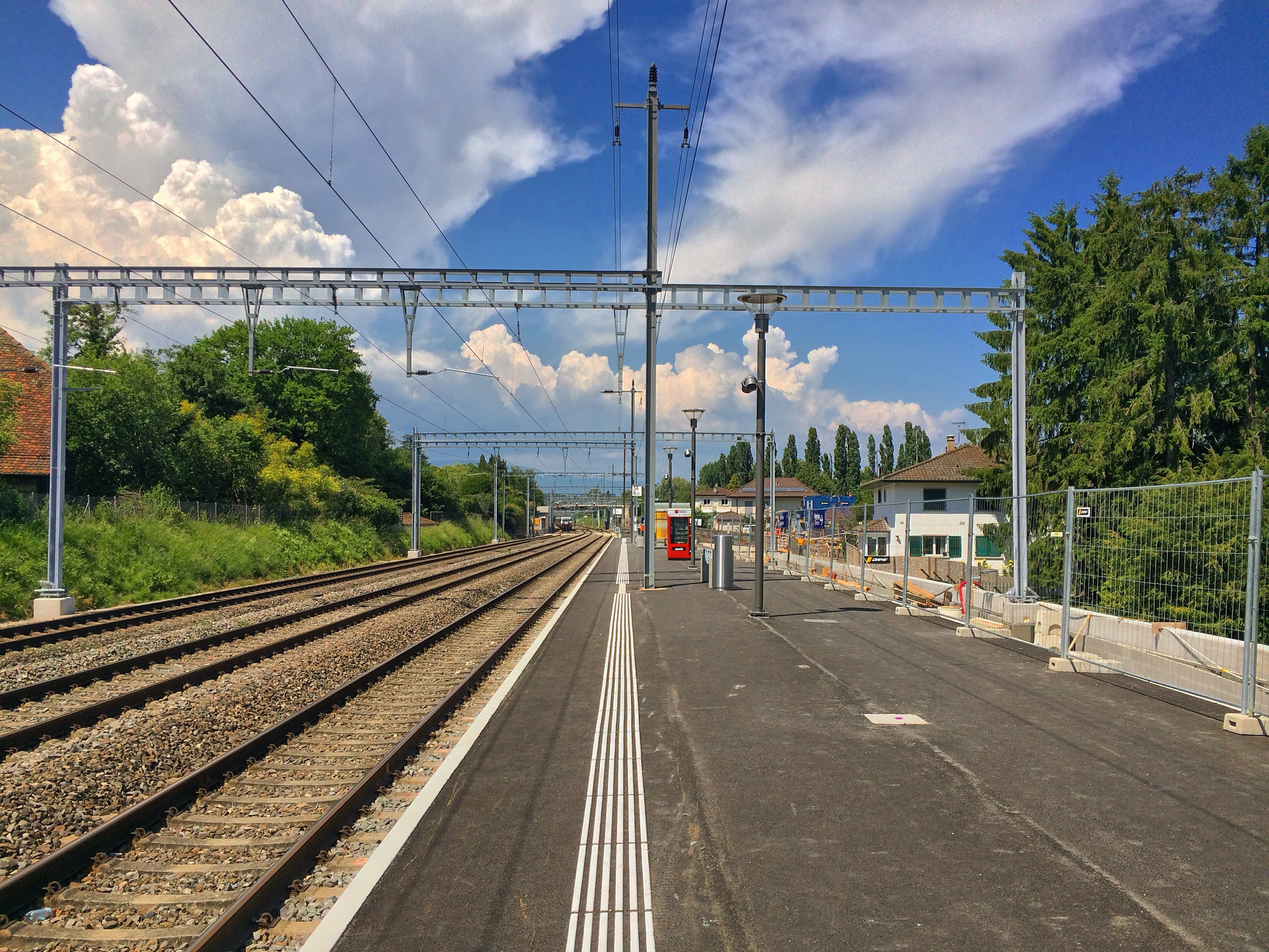 Le nouveau quai de la gare de Pregny-Chambésy.